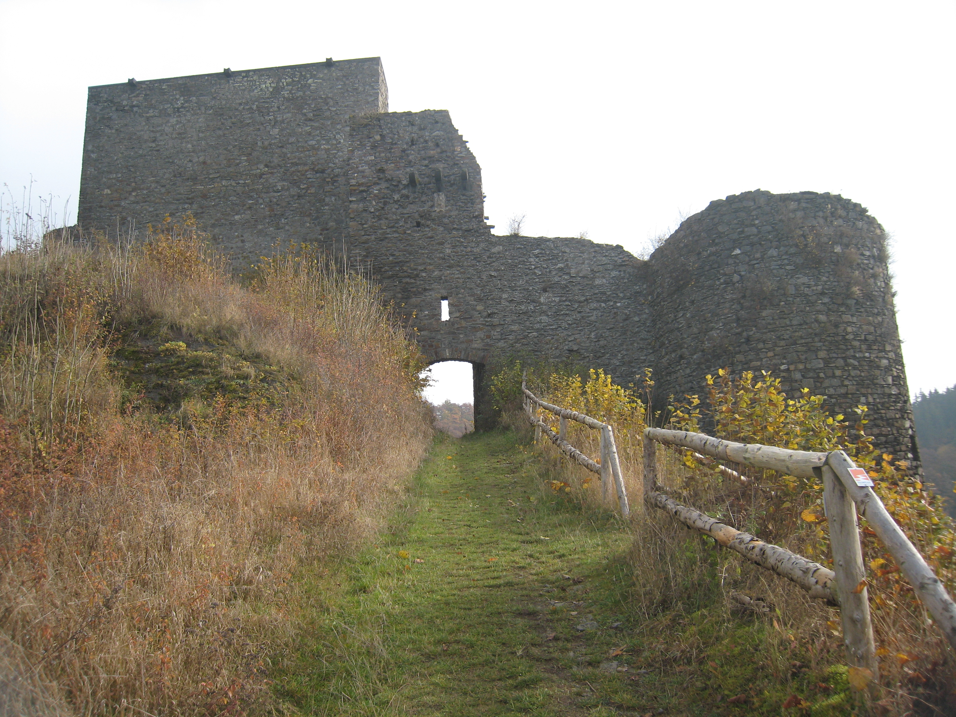 Aufstieg zur Burgruine